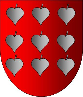 Armas de Ortíz de Zárate